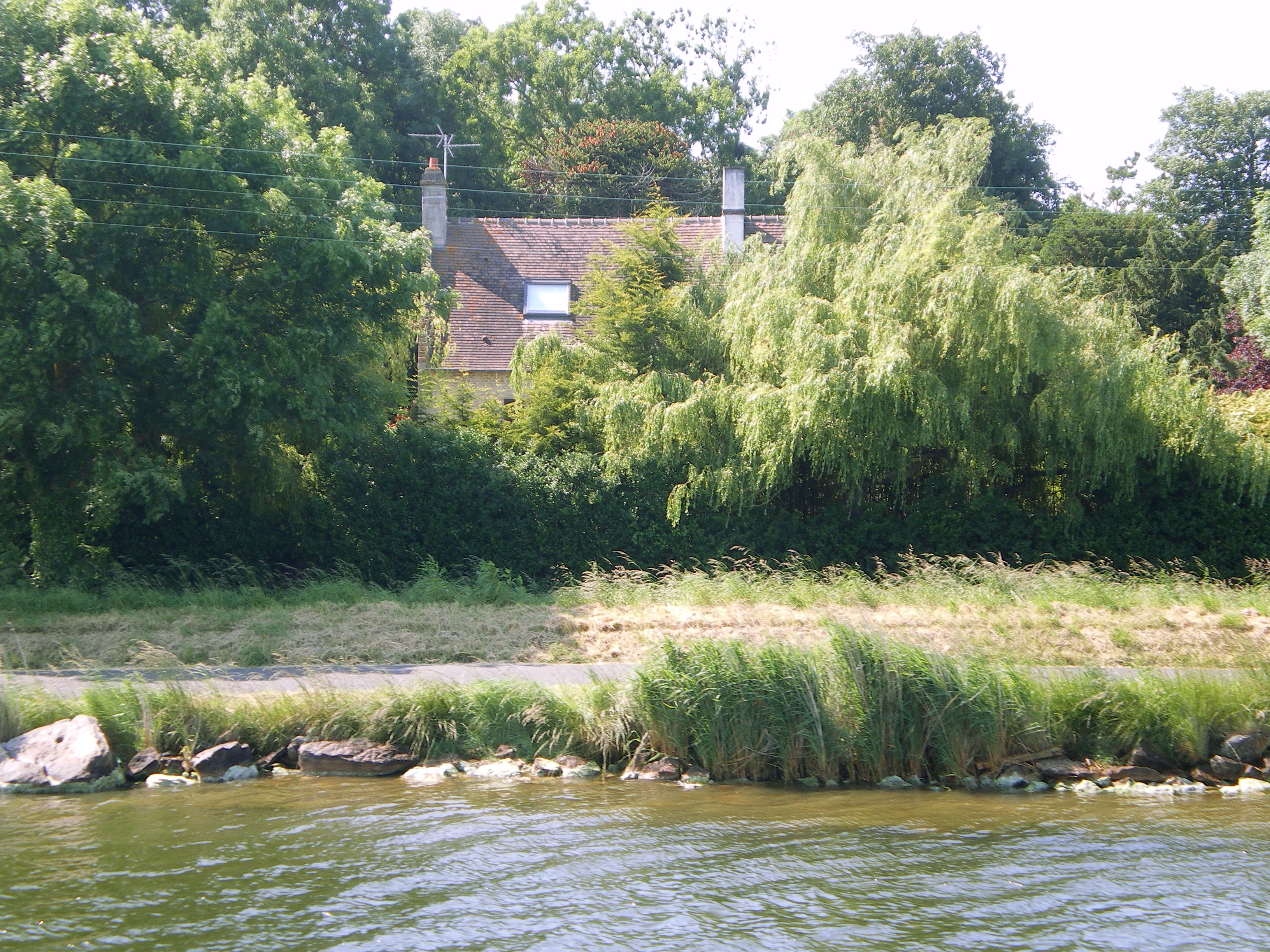 L'ancienne maison de villégiature d'Aristide Briand au bord du Canal de Caen à la mer, dans le Calvados.